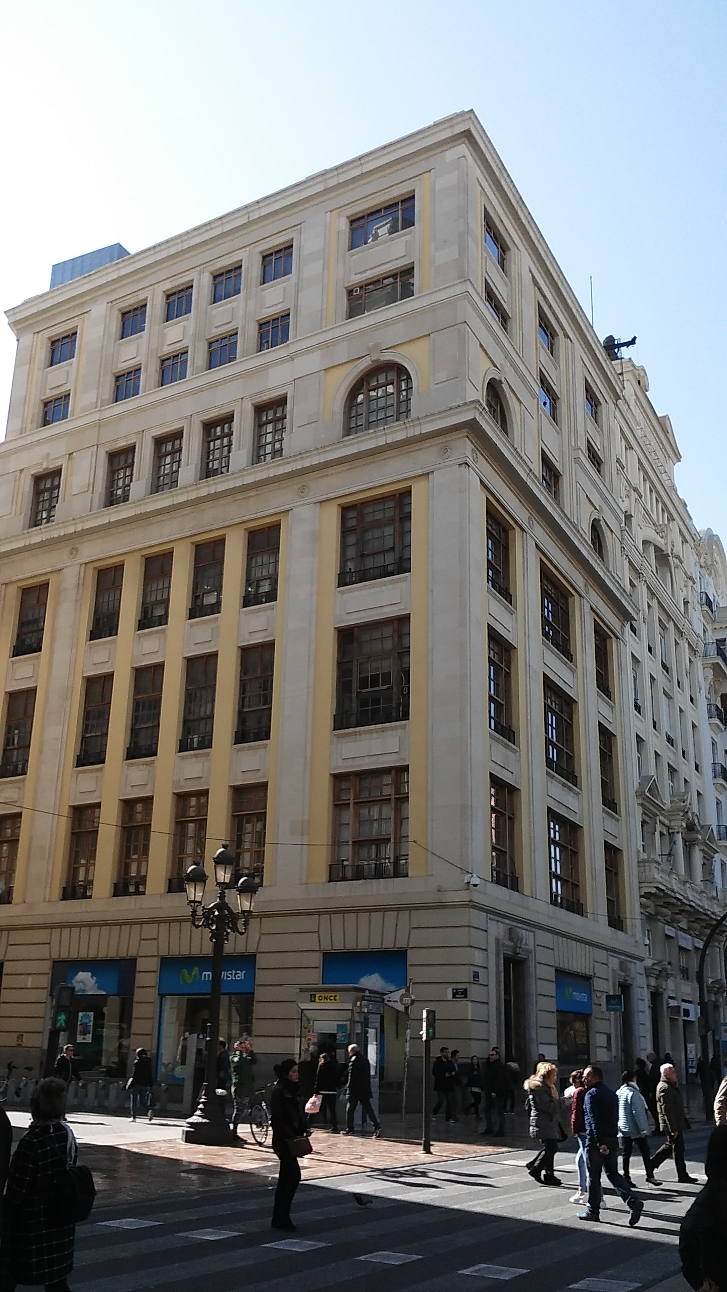 Edifici de Telefonica, en la plaça de l'Ajuntament, en Valéncia.